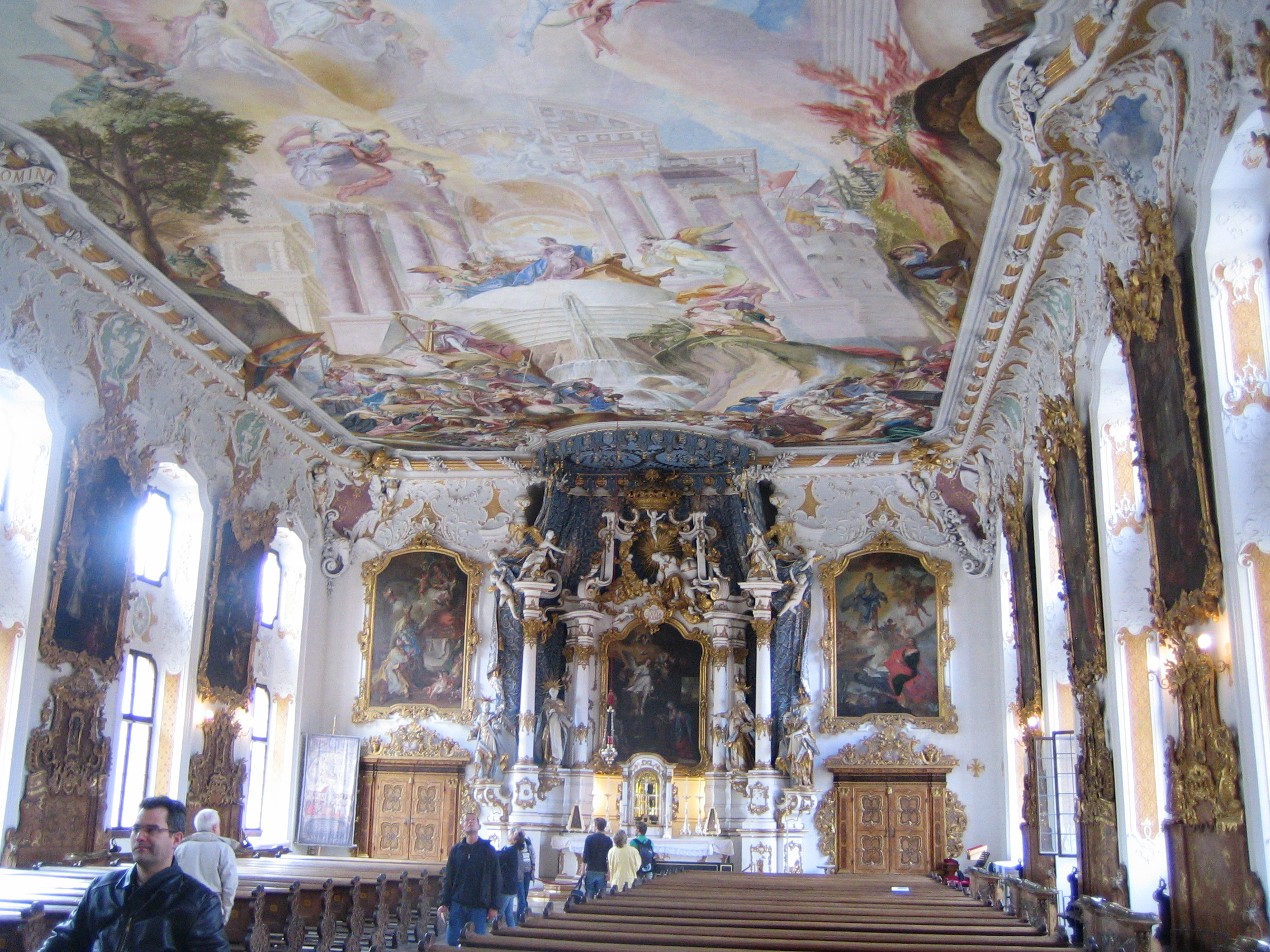 Die Asamkirche Ingolstadt von innen